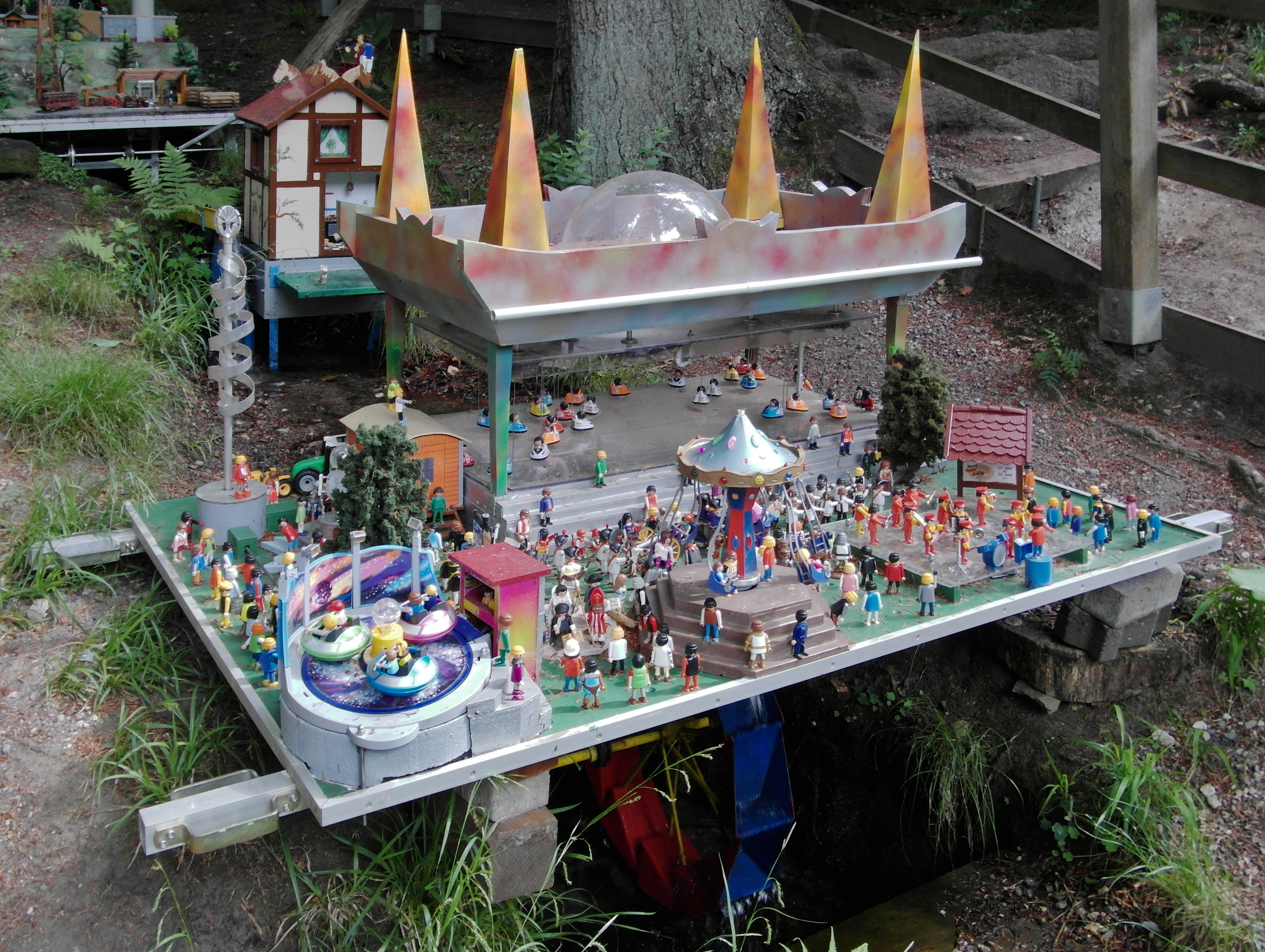 Die Modelle der Wennigser Wasserräder werden jährlich in oft überarbeitetem Design aufgebaut. Das Modell Schützenfest im Jahr 2019